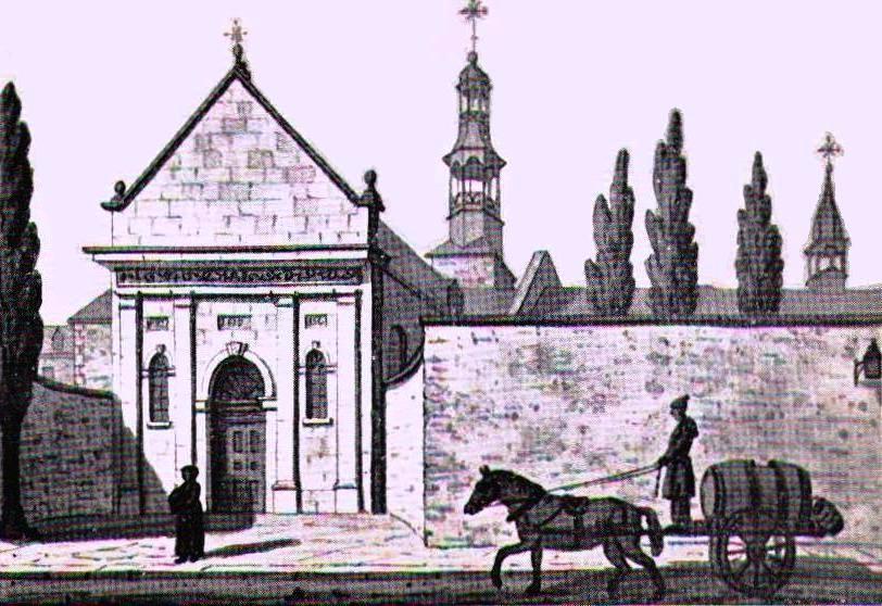 L'ancien Hôtel-Dieu de Montréal sur la rue Saint-Paul, et le charrieur d'eau. Gravure faite d'après le dessin à la sépia exécuté en 1826-1827 par John Drake, peintre anglais de passage à Montréal.